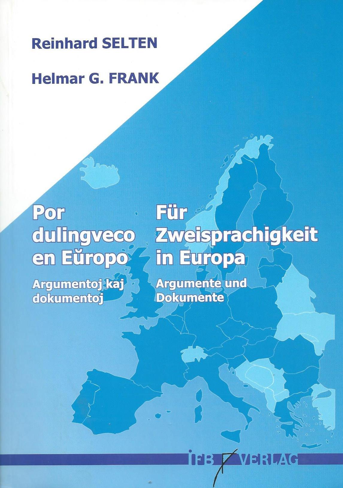 librokovrilo de "Por Dulingveco in Eŭropo", 2005